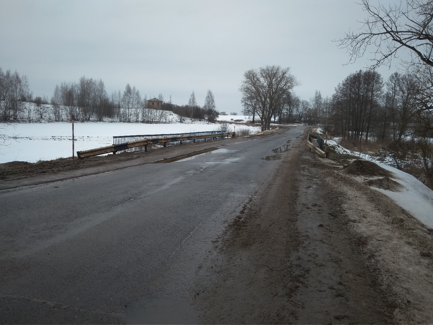 Пейзаж агрогородка Боровое Дзержинского района Минской области, часовня-усыпальница Дыбовских